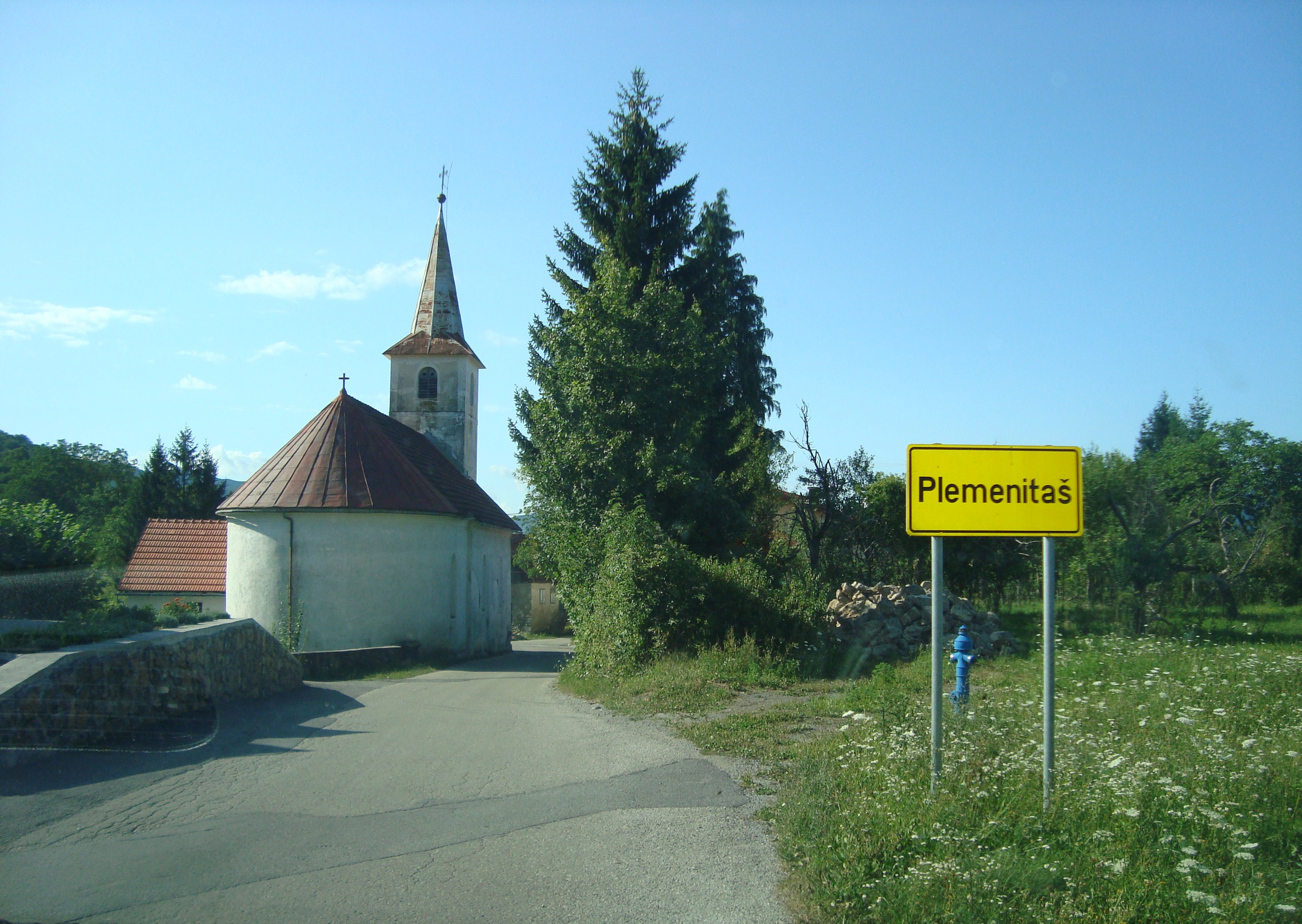 crkva Plemenitas